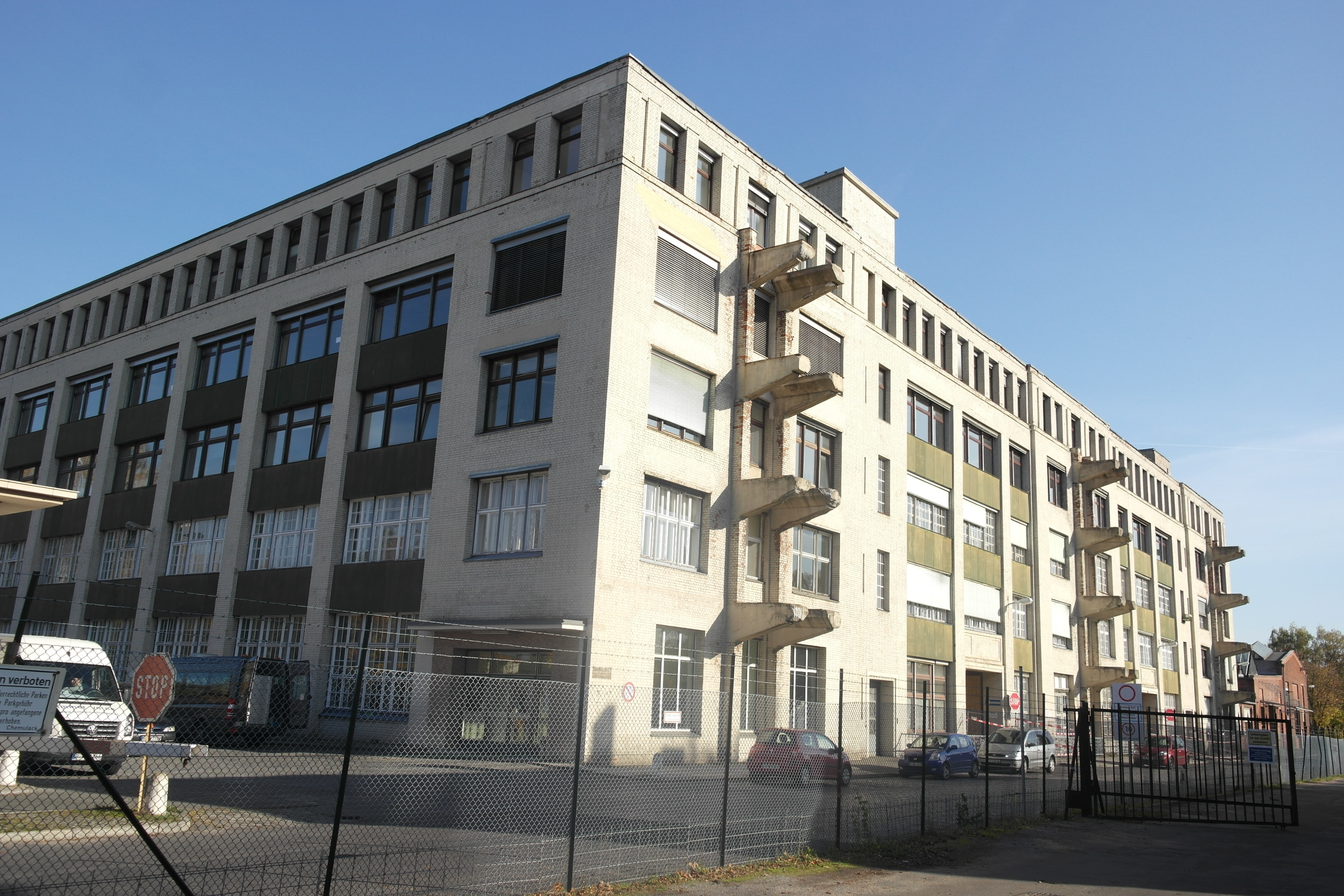 Berlin-Lichterfelde, denkmalgeschütztes Fabrikgebäude der Goertzwerke